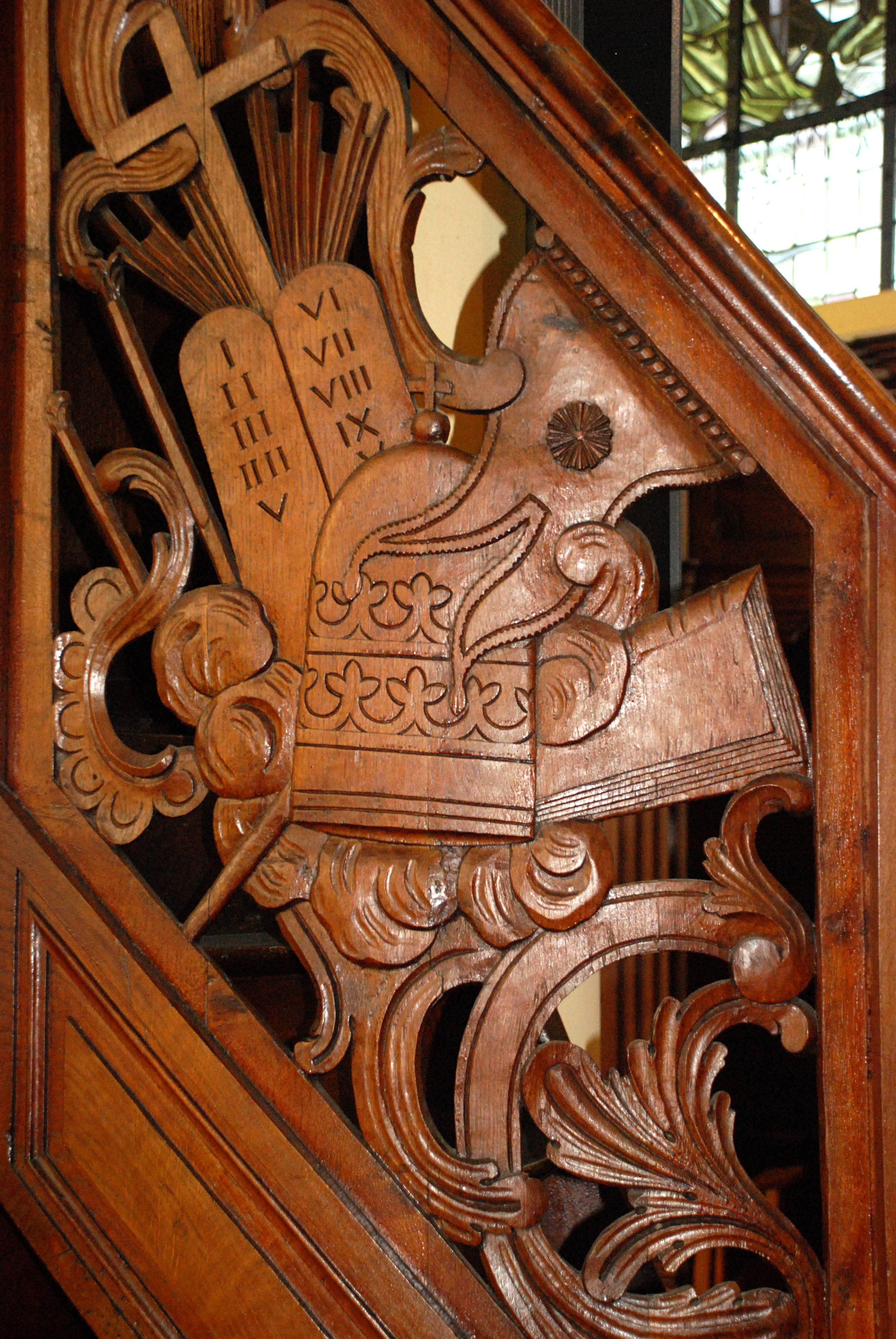 Belgique - Brabant wallon - Mont-Saint-Guibert - Église Saint-Guibert - la chaire de vérité